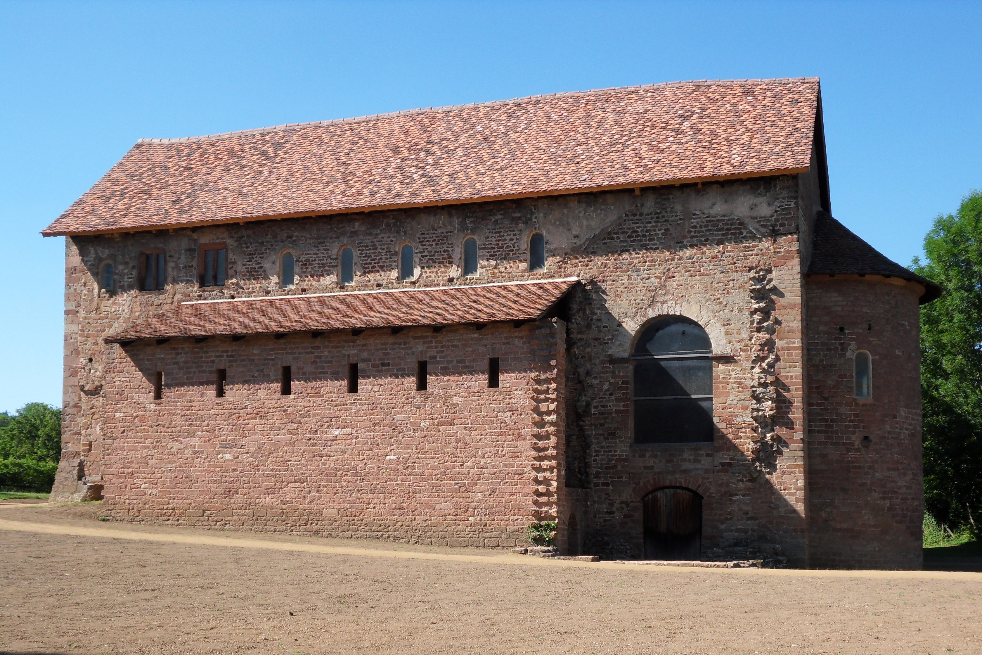 Südseite der Einhardsbasilika in Steinbach